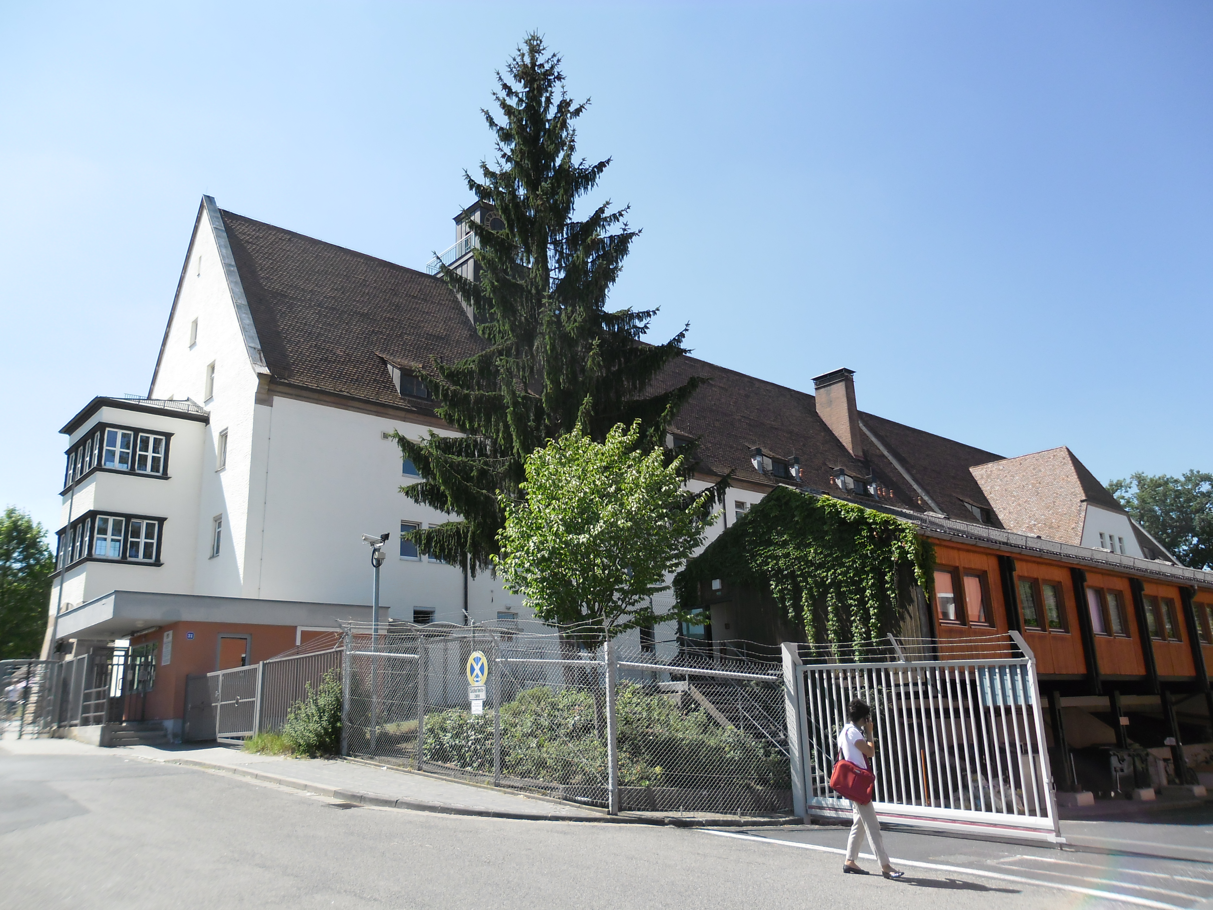 Außenansicht des Gebäudes Rothenburger Straße 31 der Zentralen Aufnahmeeinrichtung für Asylbewerber (ZAE) Zirndorf vom Haupteingang gesehen